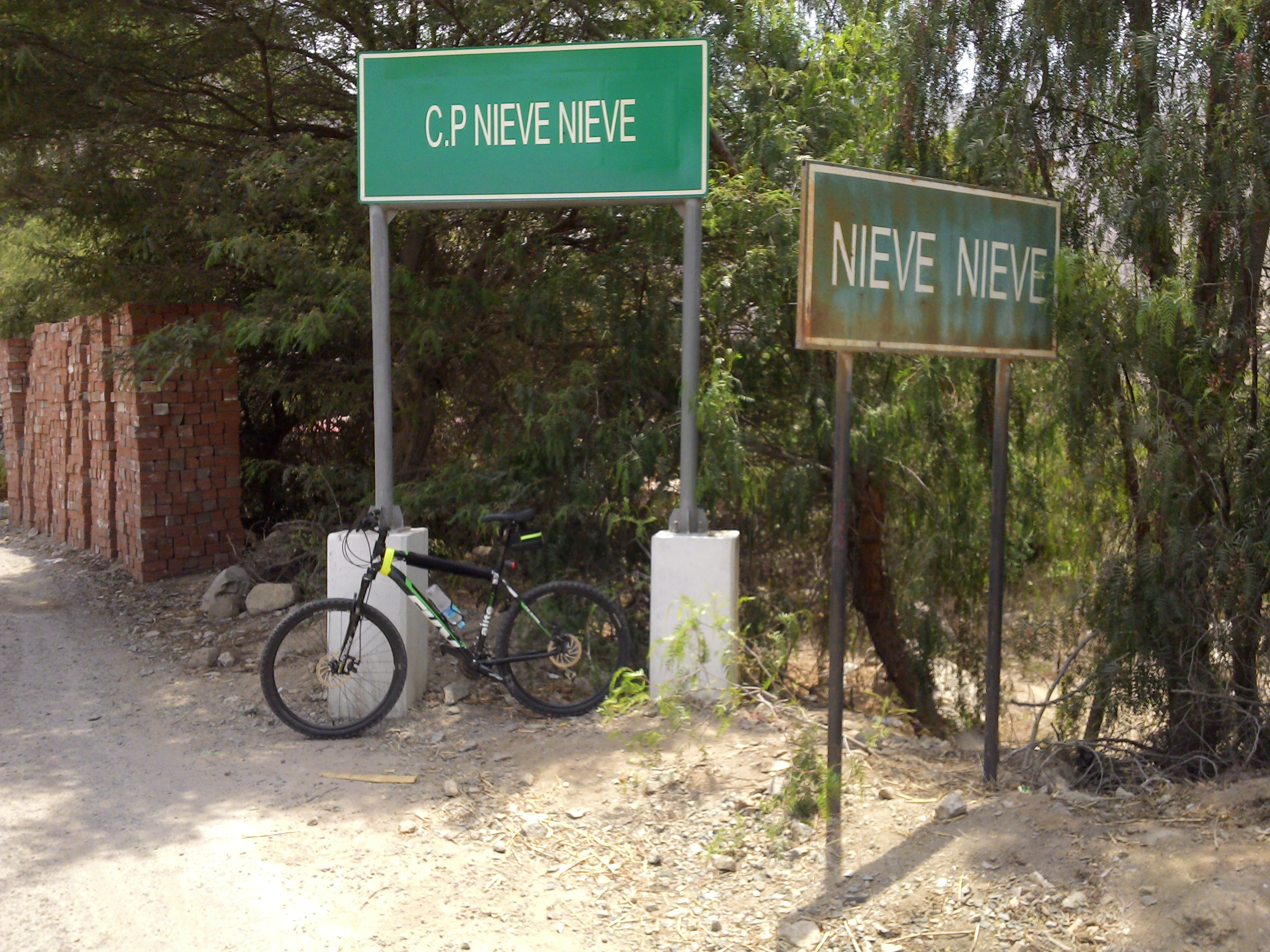 Imagen tomada al ingreso del Centro Poblado San José de Nieve Nieve, Distrito de Antioquía, Provincia de Huarochirí, Departamento de Lima, Perú